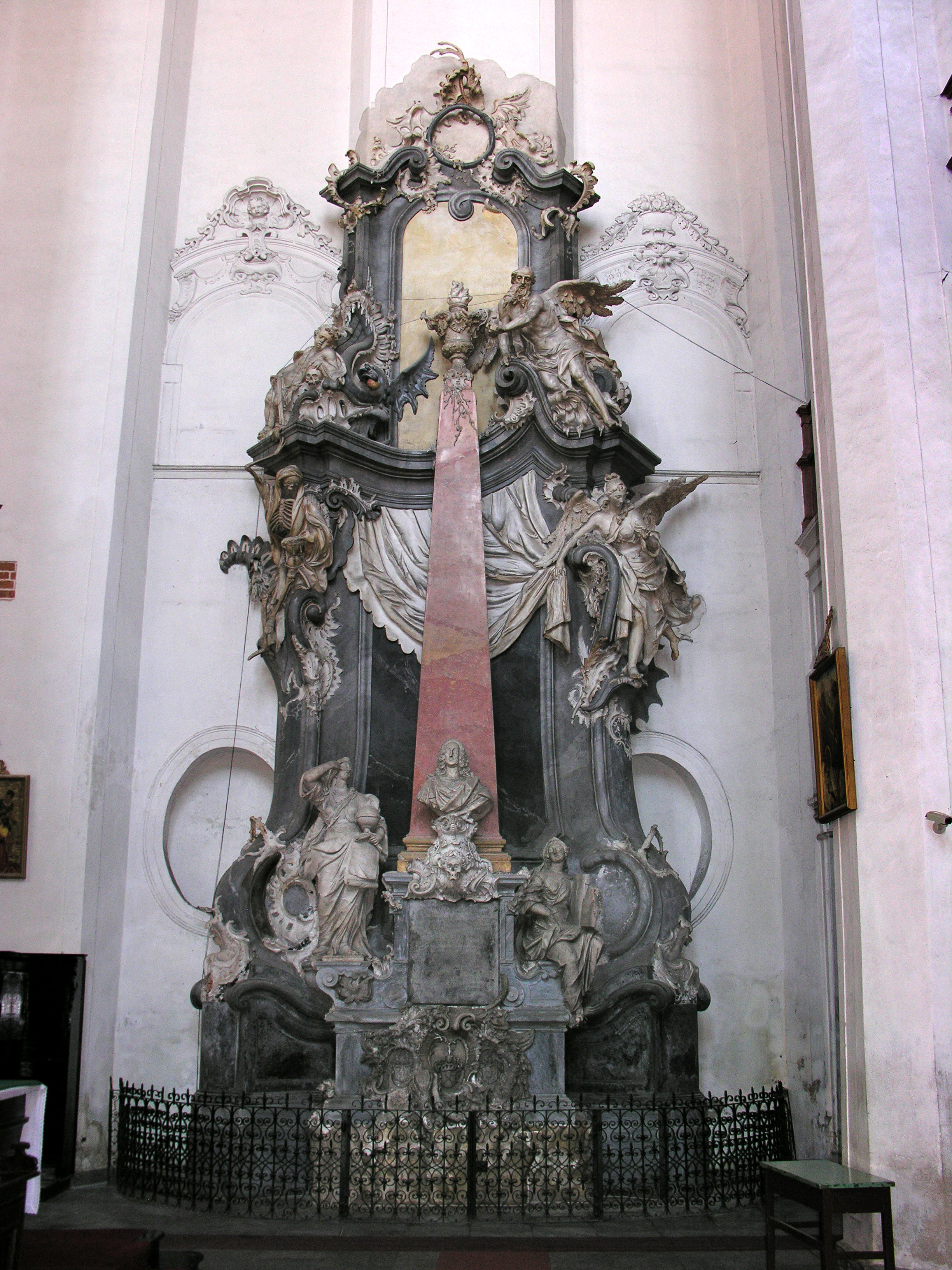 Tombeau du baron Heinrich Gottfried von Spätgen, par Franz Joseph Mangoldt, en l'église Sainte-Dorothée de Wroclaw (anciennement Breslau).